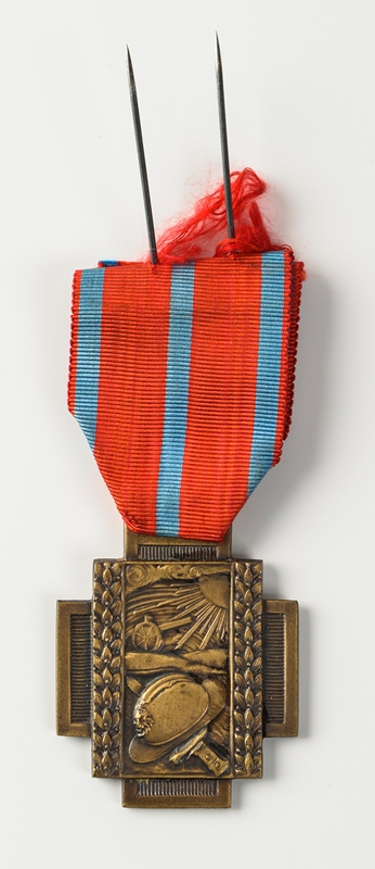 Alfons De Ceulaerde was de schoonvader van Johanna Van Dingenen. Alfons ging nog vele jaren met zijn schoondochter en zijn zoon naar de herdenkingen in Brussel. Alfons was soldaat gedurende vier jaar. Hij was in zijn laatste maand legerdienst bij het begin van de oorlog in 1914. Alfons mocht dus niet afzwaaien. Hij werd getroffen door een kogel in de buik. Alfons werd overgebracht naar Brighton. Van zodra hij genzezen was moest hij terug naar het front. Zijn vrouw kwam hem opzoeken met hun kind dat toen één jaar was. Zijn vrouw sprak geen Engels. Met dit bezoek waren de ouders niet akkoord maar zij is toch gegaan omdat haar zuster haar wou vergezellen. Toen zij in Engeland waren moesten ze blijven tot de oorlog voorbij was. Alfons vertelde veel over de oorlog; over gevechten van man tegen man, enz.. Hij was een kleine man en was heel fier op zijn prestaties. Alfons stond bij de Brabançonne steeds fier recht. Hij werd bevangen door gas aan het front en moest hierdoor altijd heel zwaar hoesten.